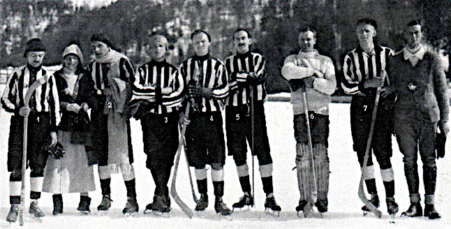 Berliner Schlittschuhclub 1913 in St. Moritz (LIHG-Meisterschaft) left to right: Alfred Steinke, unknown, Franz Lange, W Sachs, Bruno Grauel, Dr Charles Hartley, Boak, Hans Georgii